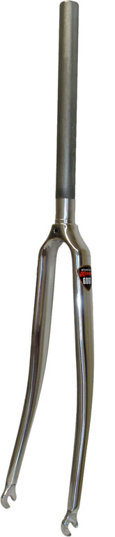 Motiv: Fahrradgabel der Firma Kinesis. Die Gabelscheiden sind aus Aluminium, der 1" dicke Gabelschaft aus Stahl. Gabelscheiden und Gabelschaft sind im Gabelkopf eingeklebt. Durch das Loch im Gabelkopf wird der Bremsbolzen der Vorderradbremse (Rennradbremse) geschoben und dann rückseitig verschraubt. Fotograf: KMJ Aufnahmedatum: 2004-06-19 Aufnahmeort: Studio Bildname: Fahrradgabel_01-p_KMJ.jpg Bildgröße: 165 Pixel x 768 Pixel (14.056 Bytes)